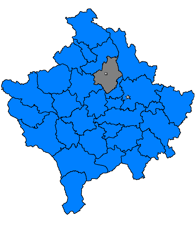 Vushtrri, Kosovë 2006